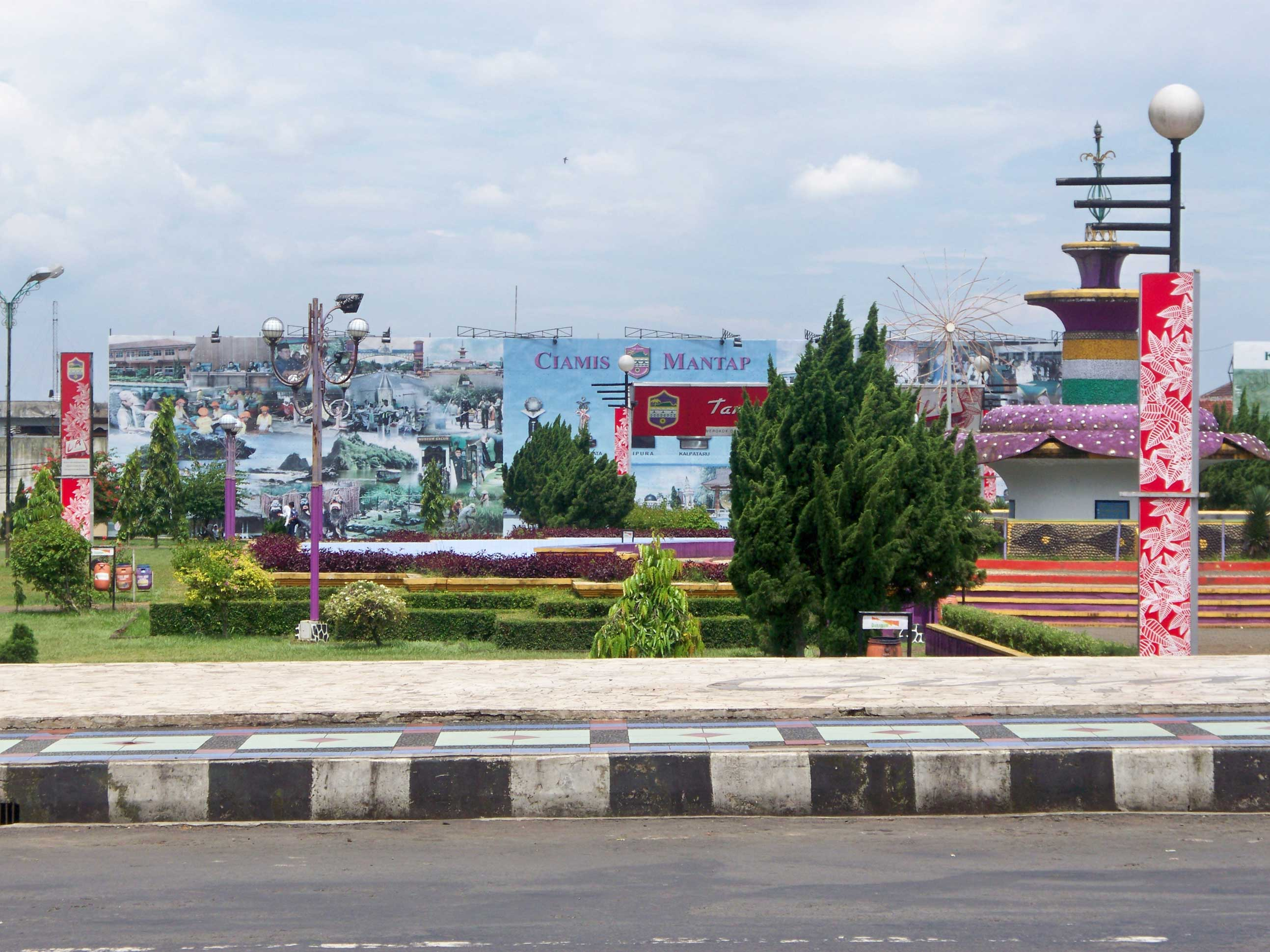 Alun-alun Ciamis